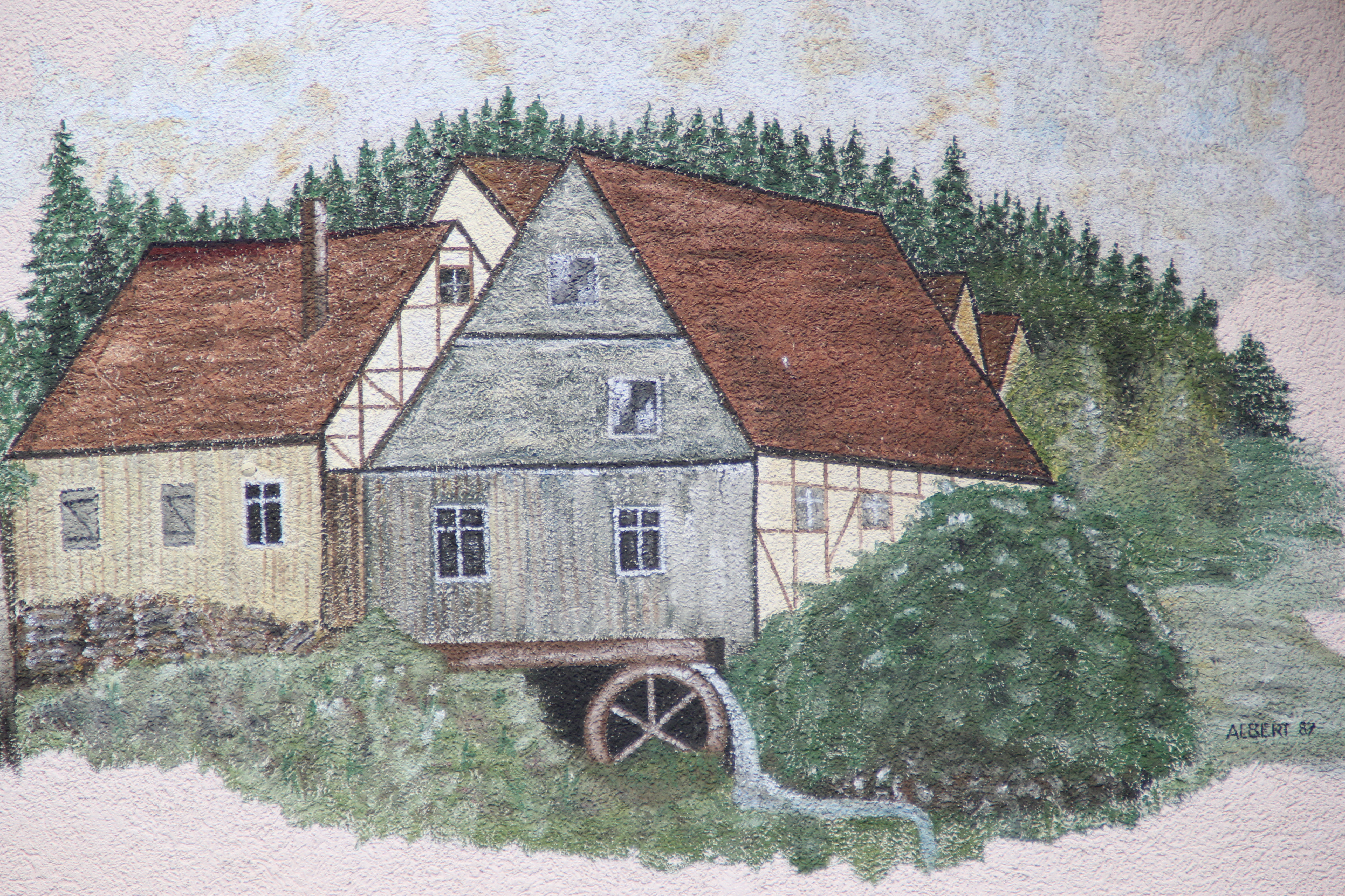 Abbildung der Kahlmühle (wie sie früher einmal aussah), an die Fassade des Gebäudes gemalt